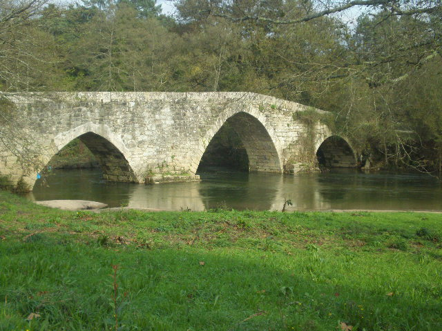 Ponte das partidas